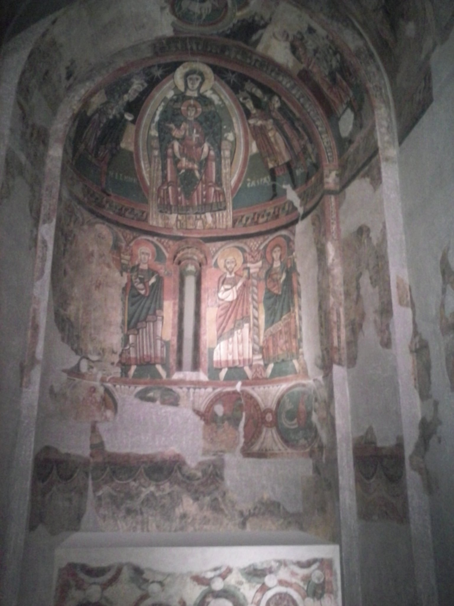 Ábside de Santa María de Taüll, pintura románica. Actualmente en el MNAC